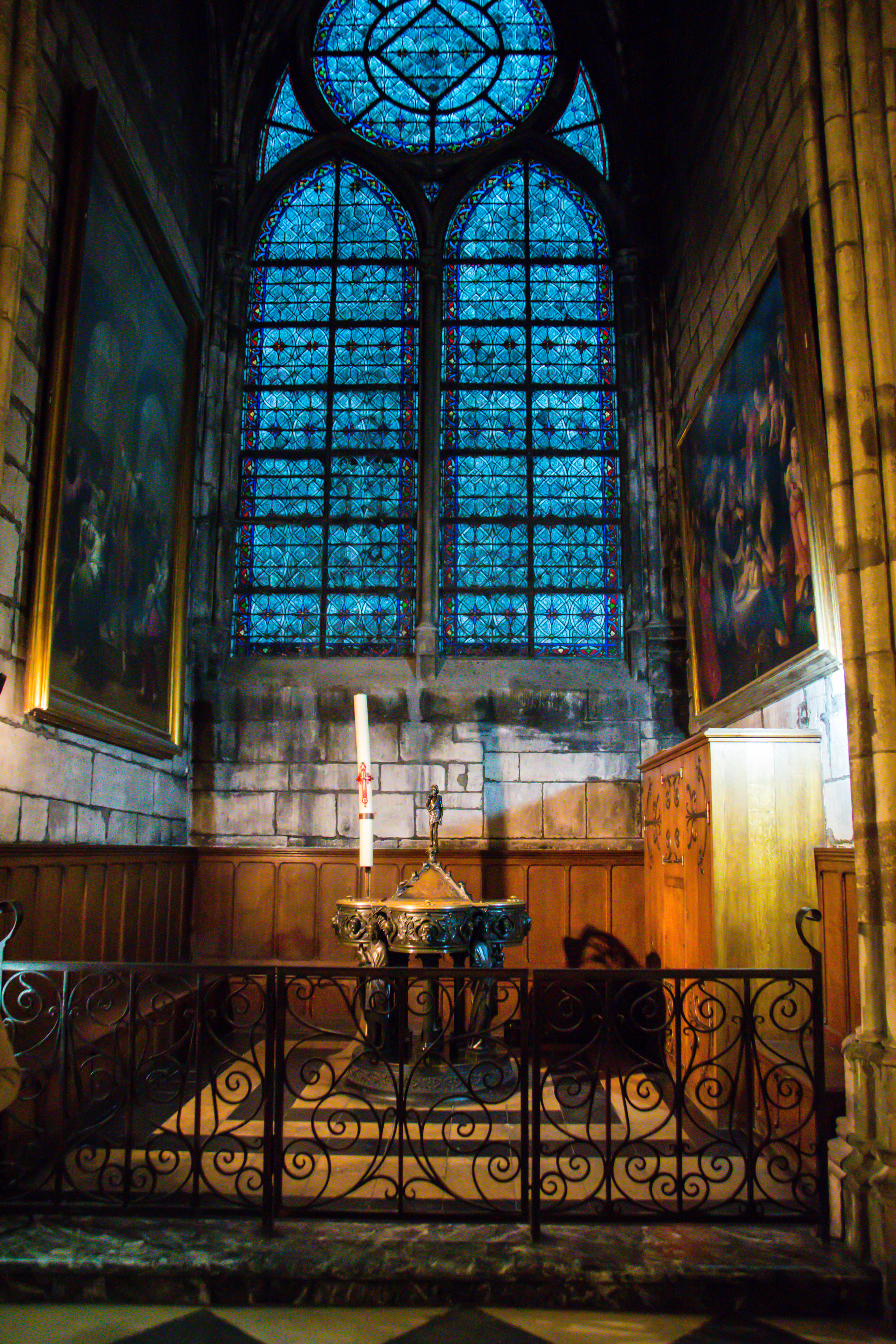 Paris, France